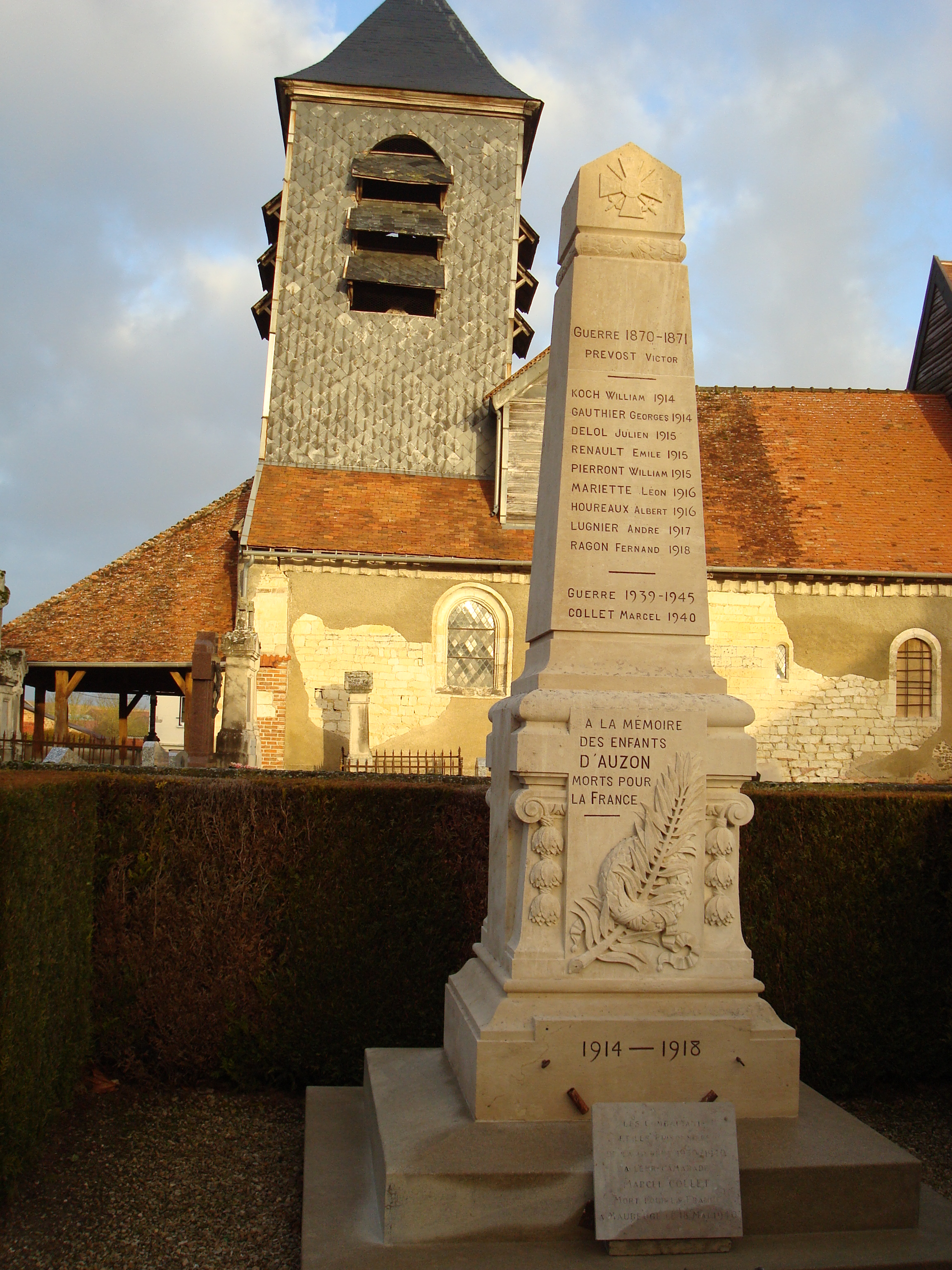 église d'Auzon les Marais (Val d'Auzon) (Aube)